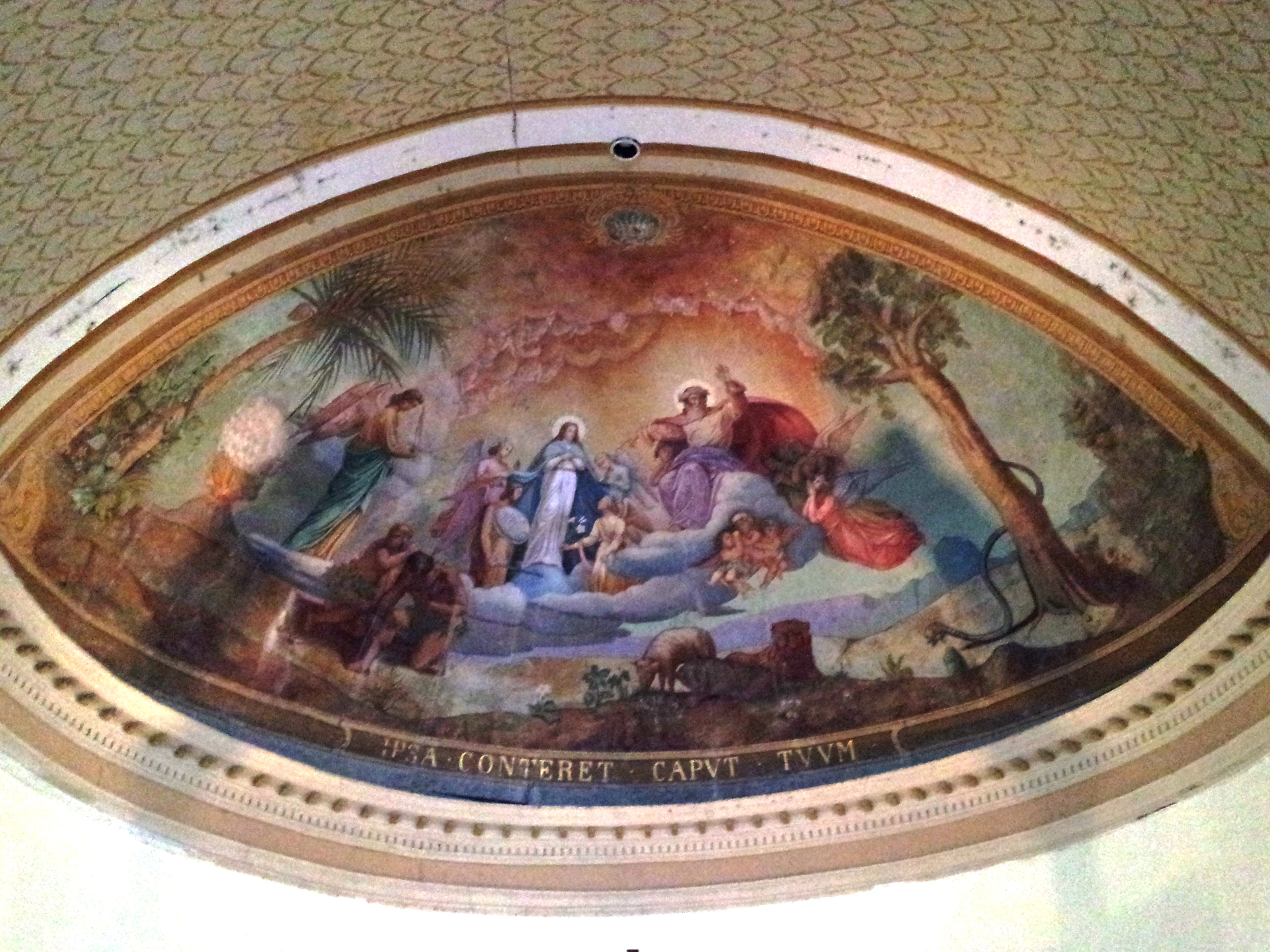 Abside peinte de l'église Notre-Dame de la Délivrande du Morne-Rouge